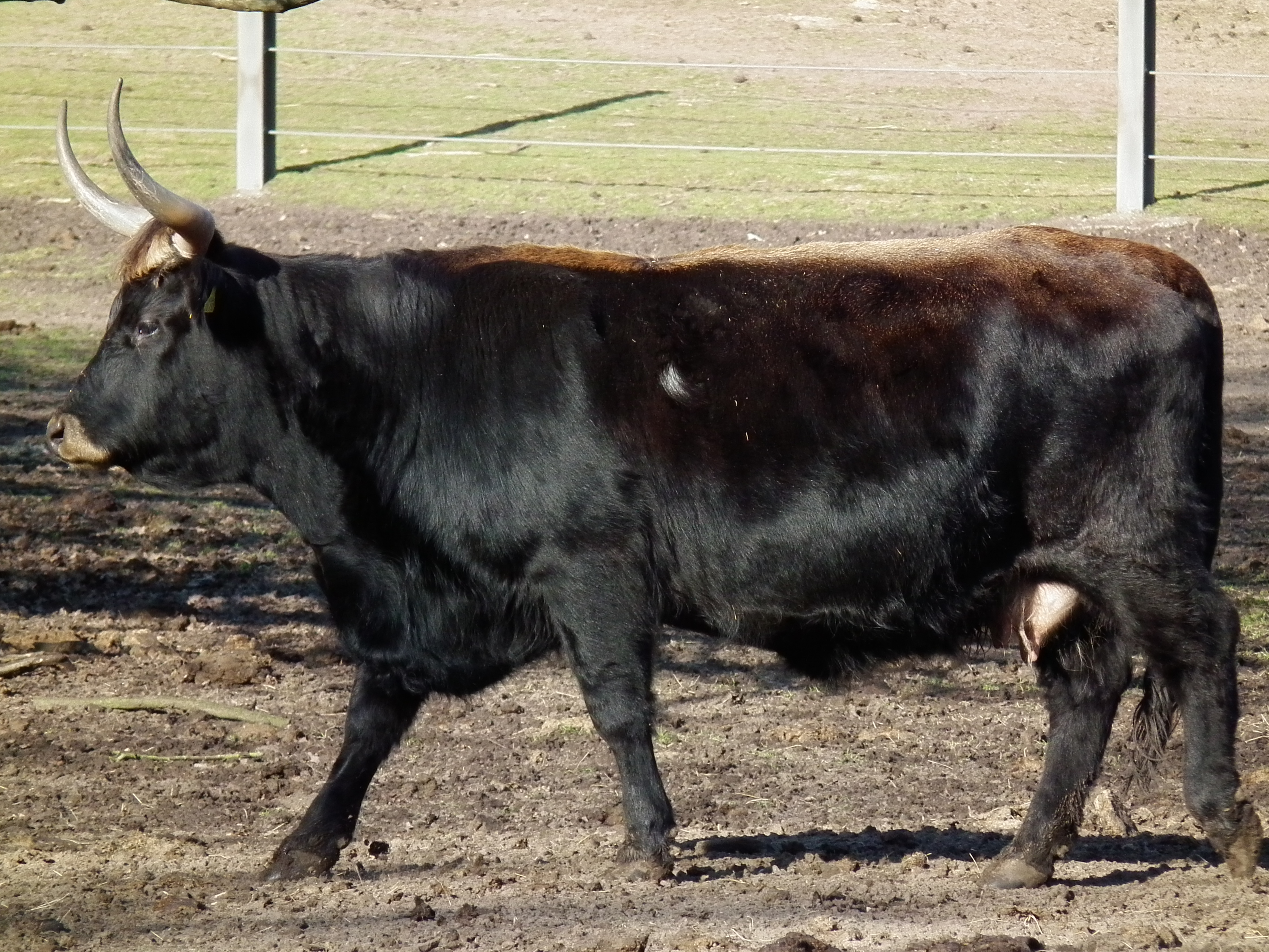 Rückzüchtung des Auerochsen (Bos primigenius), fotografiert im Wildgehege Rheinauer Wald (Mannheim, Baden-Württemberg, Deutschland)